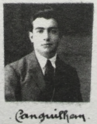 中文（中国大陆）: 1924年考入巴黎高等师范学院的冈圭朗